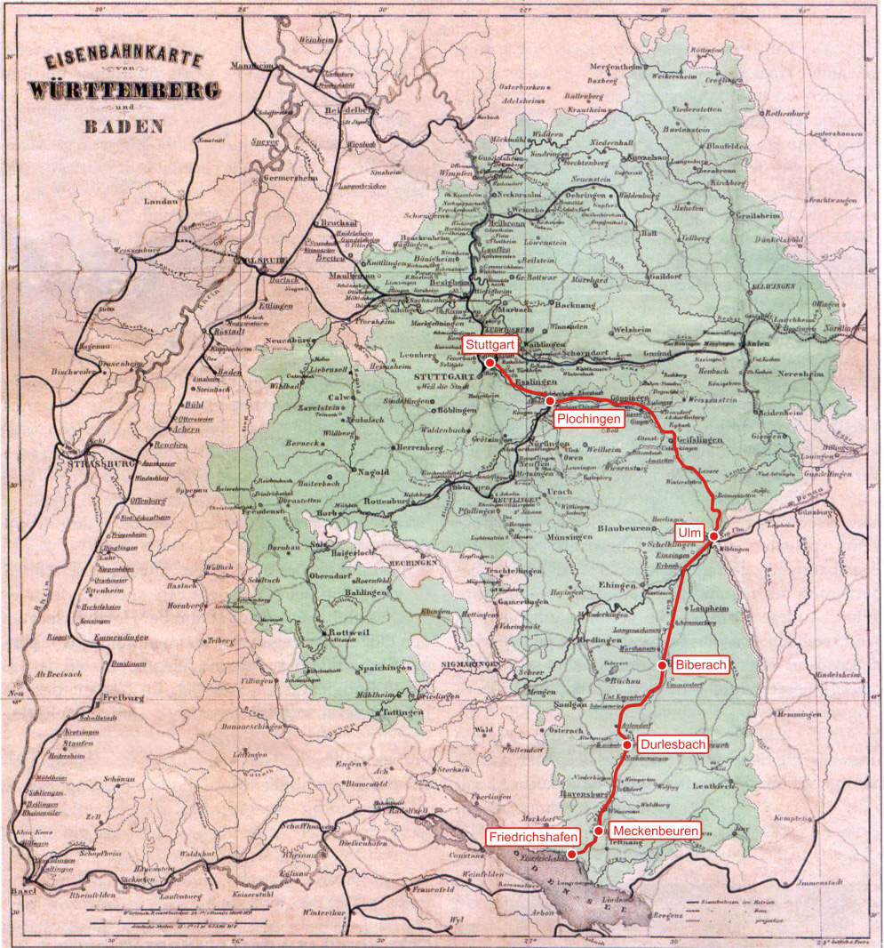 Verlauf der Schwäbischen Eisenbahn mit den Stationen, die Im Lied "Auf de' schwäb'sche Eisebahne" benannt werden.